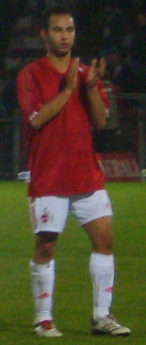 Salvatore Gambino, 1.FC Köln